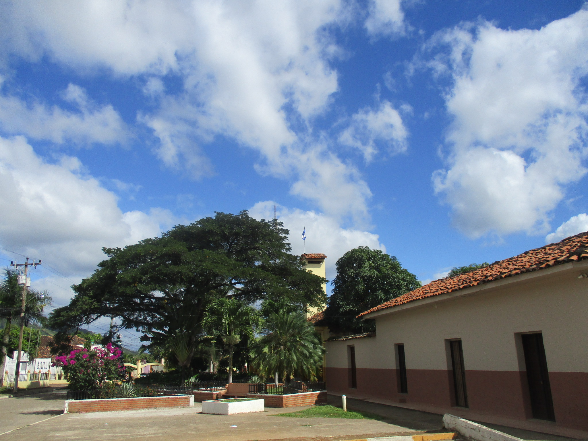 alcaldia municipal en Catacamas en Honduras